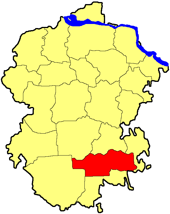 Батиревський район Чувашії